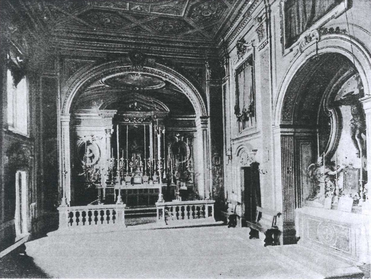 Chiesa distrutta di Santa Maria in Cacabaris o di Santa Maria dei Calderari